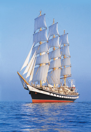 Учебный фрегат «Паллада» IMO Number: 8511847 MMSI Number: 273815200 Callsign: UDUI Length: 94 m Beam: 14 m